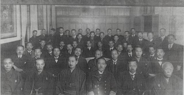 1915年「尚昌侯爵帰朝祝賀会」東京沖縄県人会。前列右から、嵩原安冝、神山政良、漢那憲和、尚昌、太田朝敷。他に親泊朝擢、東恩納寛惇、上運天令儀、山田真山らが居る。